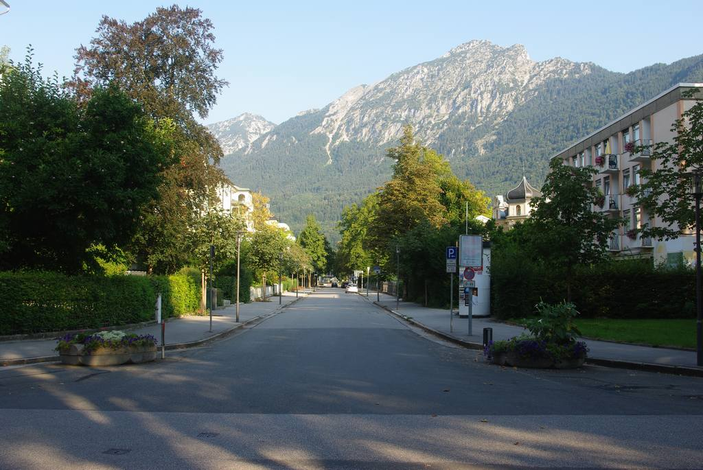 Mozartstraße in 83435 Bad Reichenhall